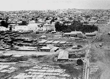 Алтай, Конец XIX века